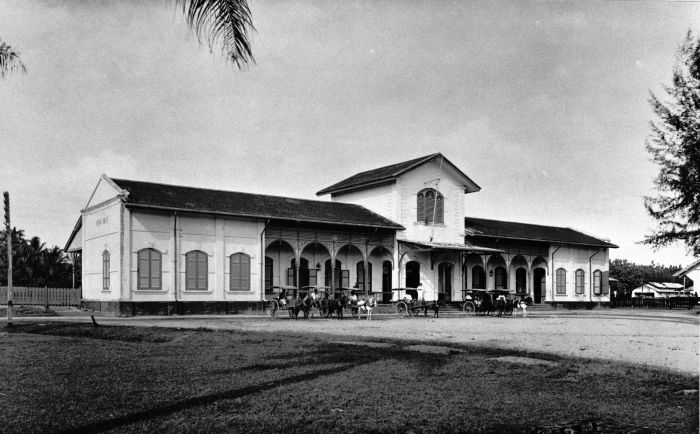 Foto. Het station van Timbang Langkat, aan de Deli-spoorlijn, oostkust Sumatra